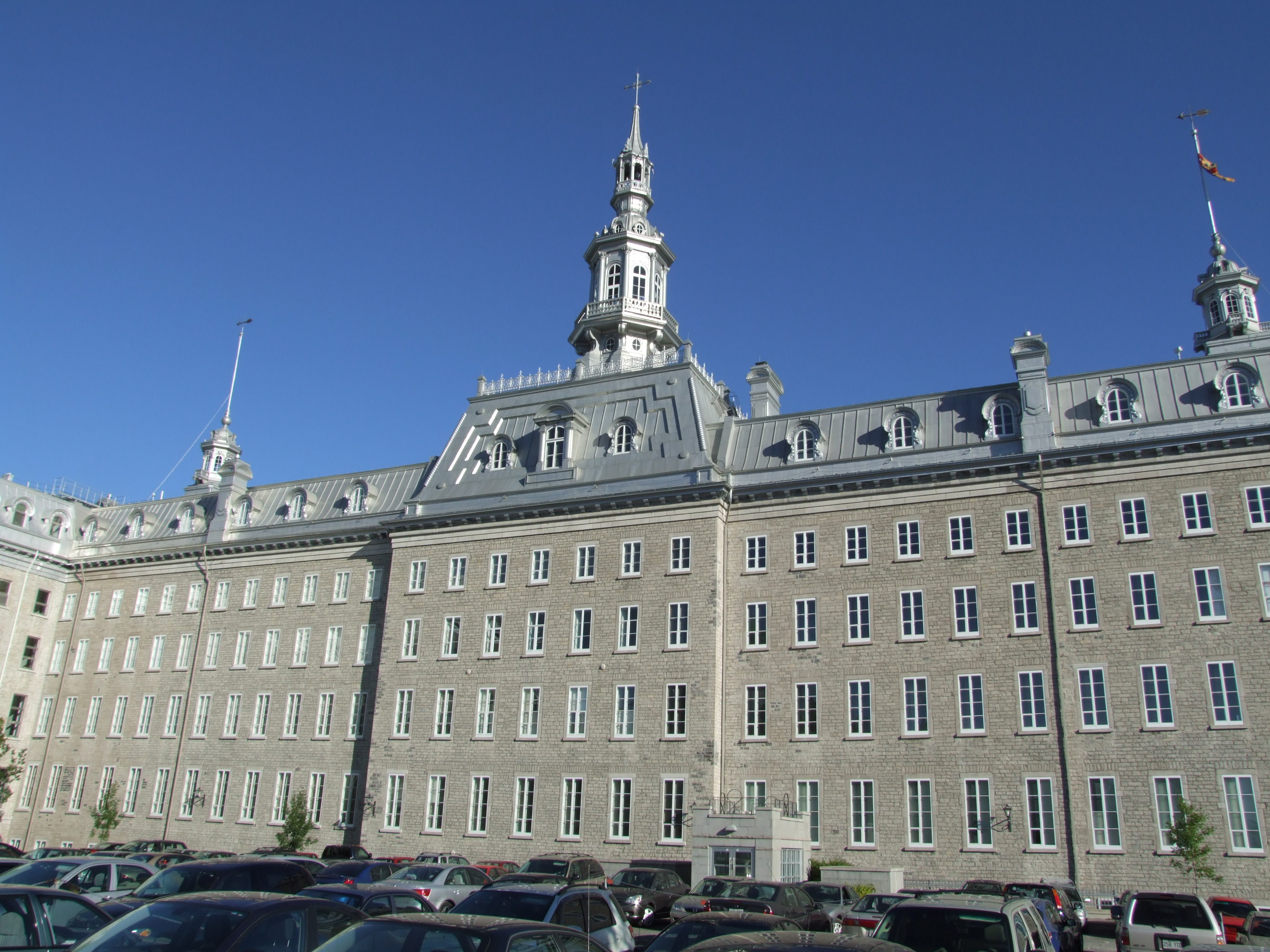 ville de Québec, CANADA